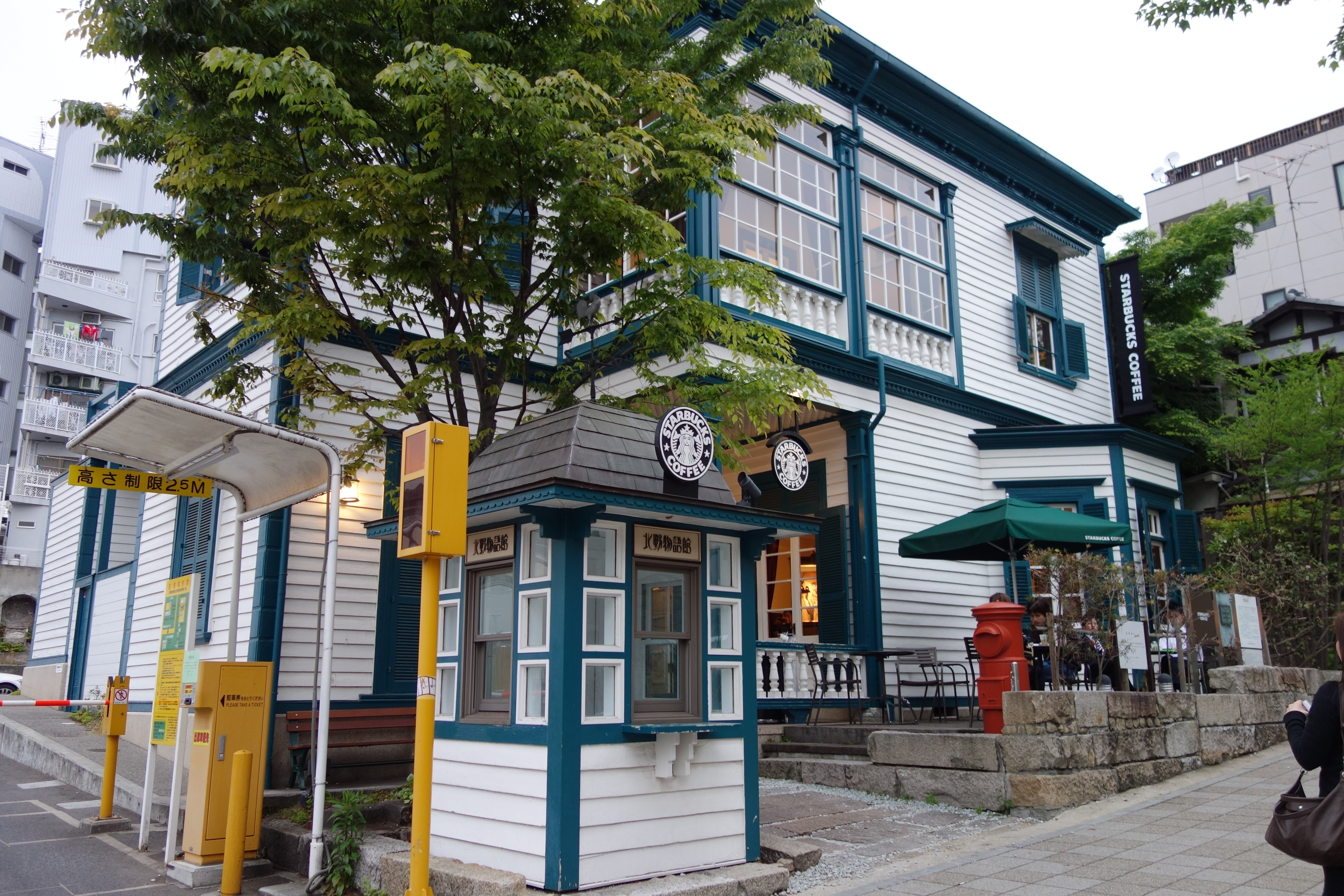 旧フロインドリーブ邸（北野物語館）